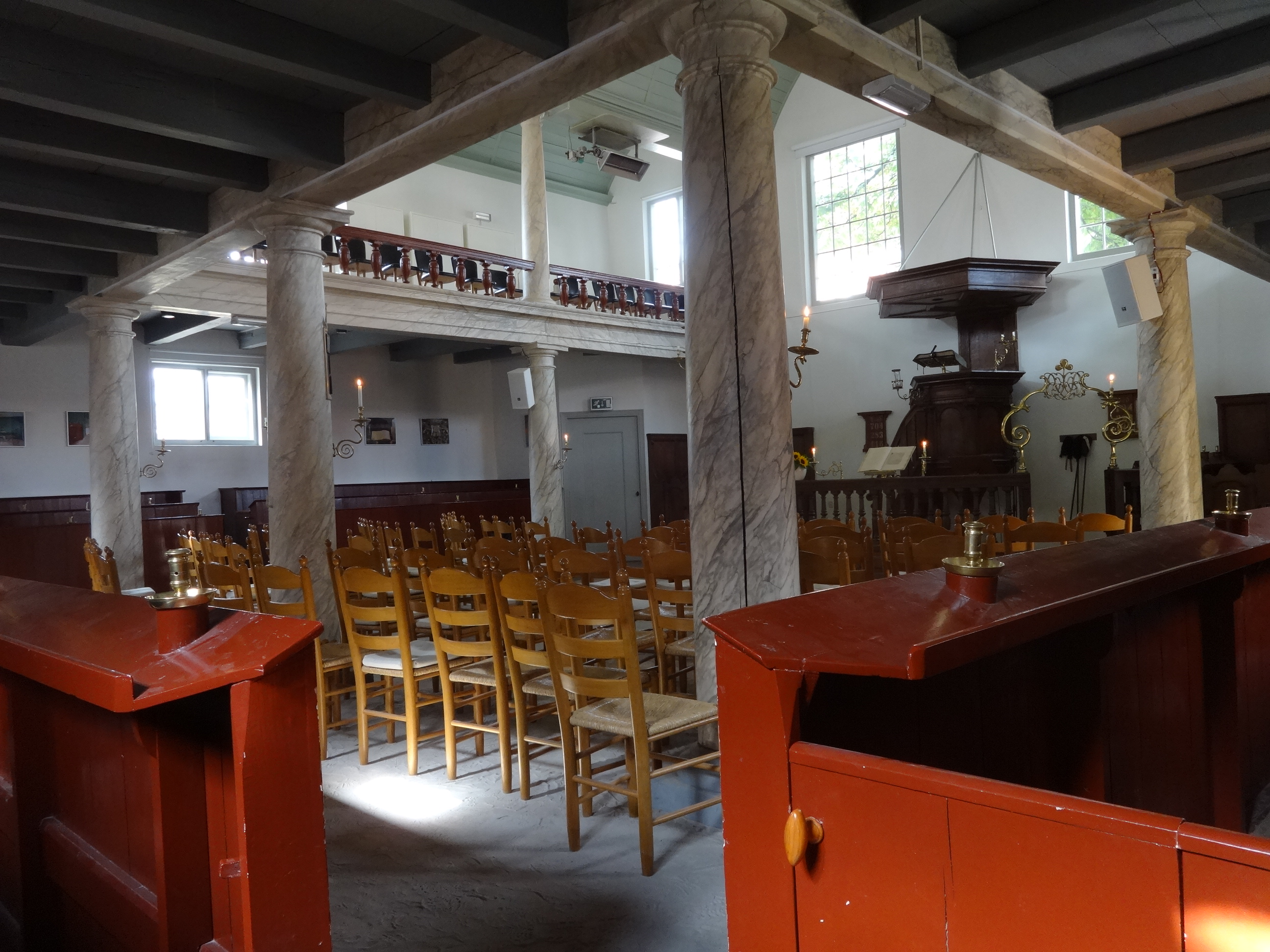 Remonstrantse kerk Alkmaar, church interior